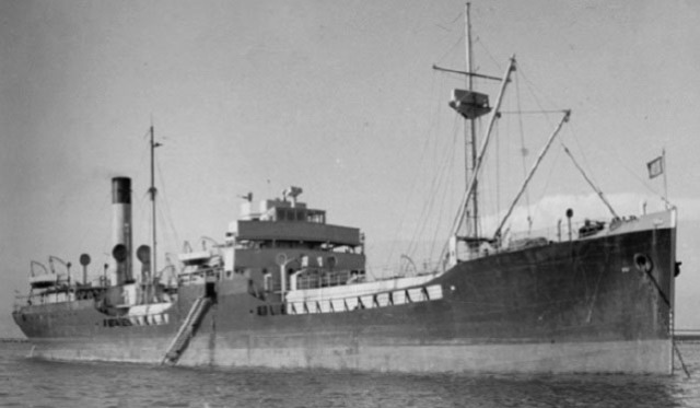 Buque petrolero del Perú BAP Pariñas